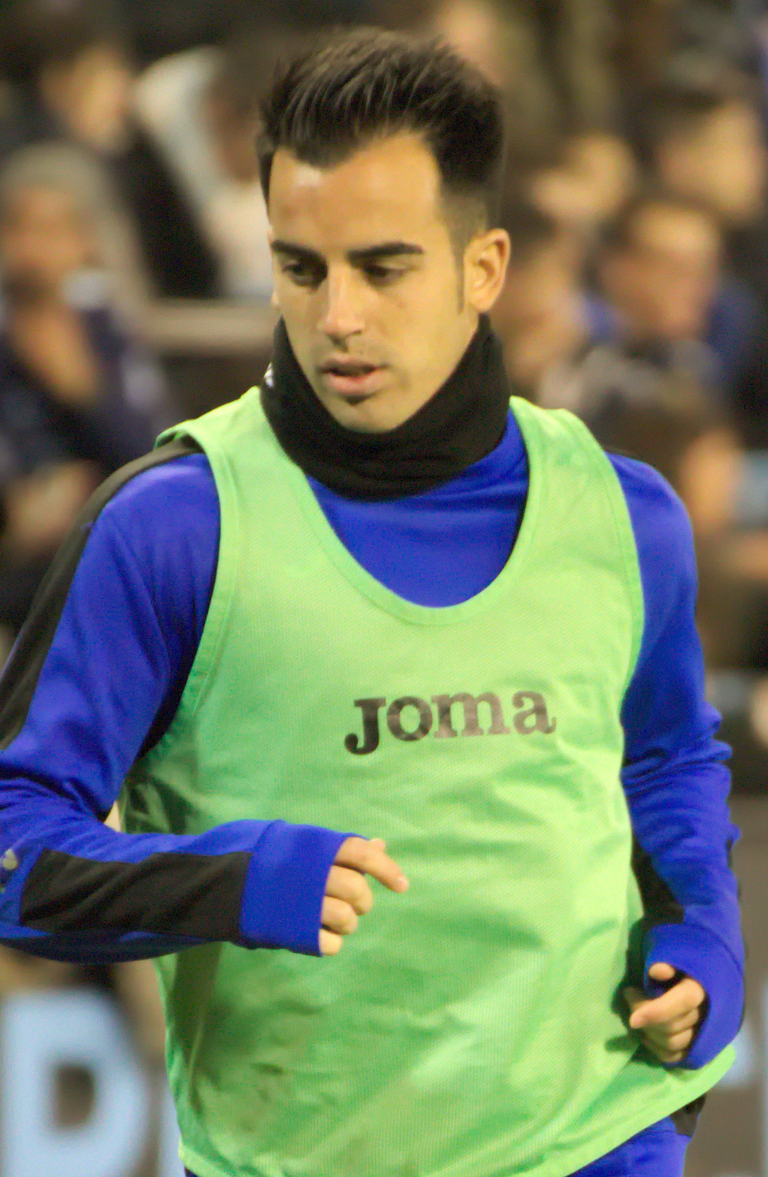 Jurado - RCD Espanyol